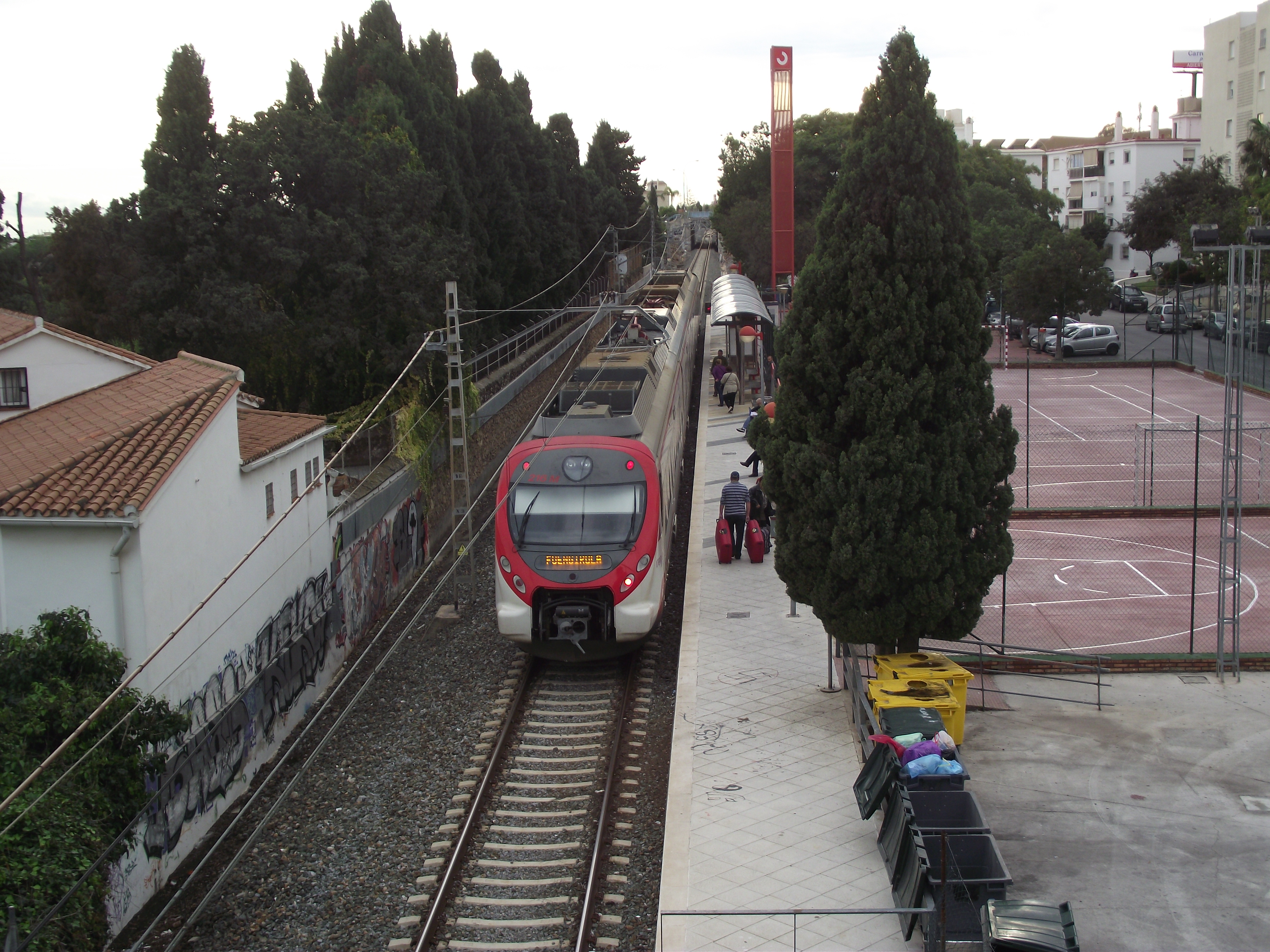 Halte Montemar Alto op de Fuengirola - Malaga spoorlijn